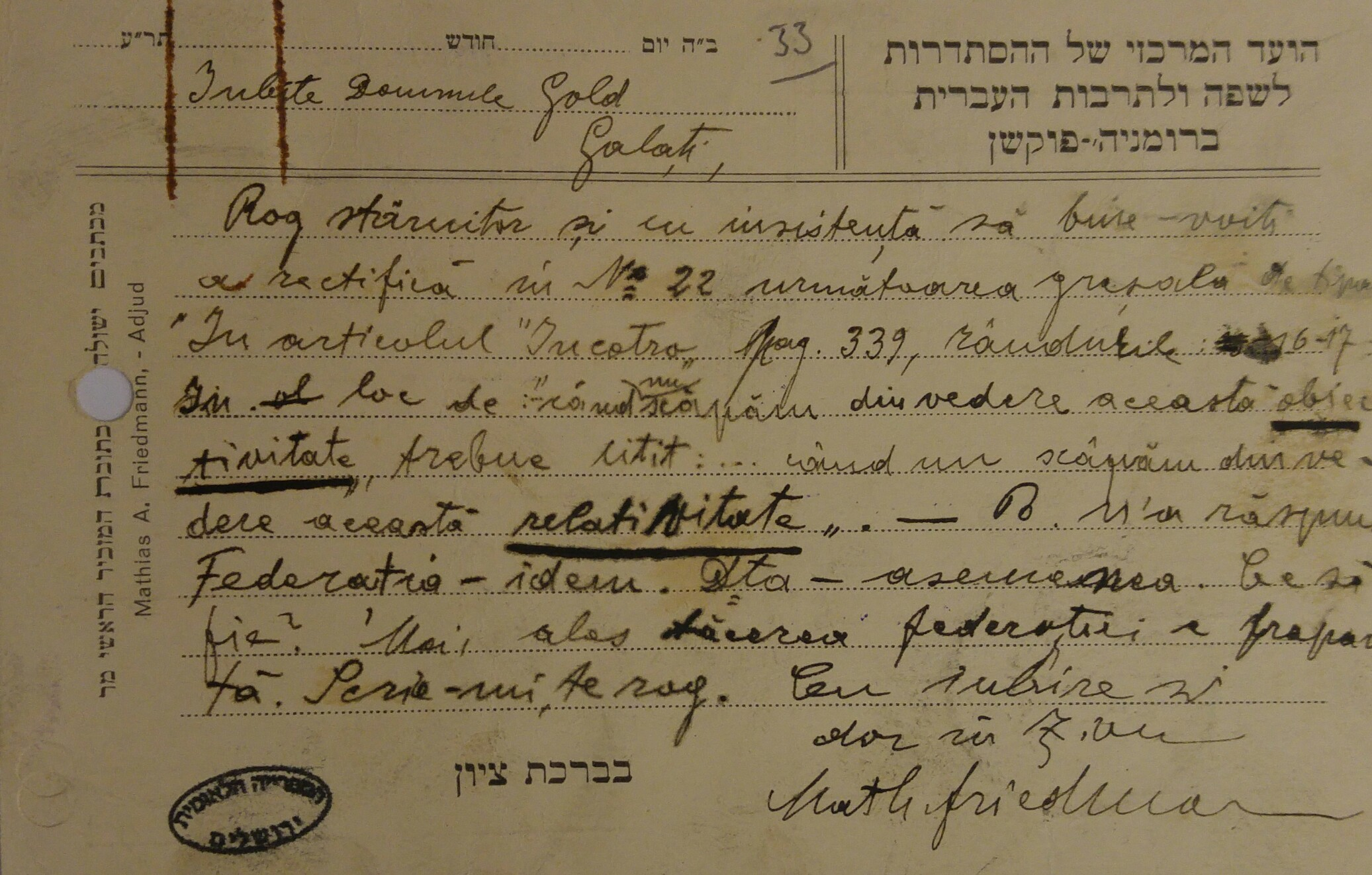 גלויה מאת ממתיהו אהרן פרידמן אל עורך עיתון התקווה גולד ברומניה